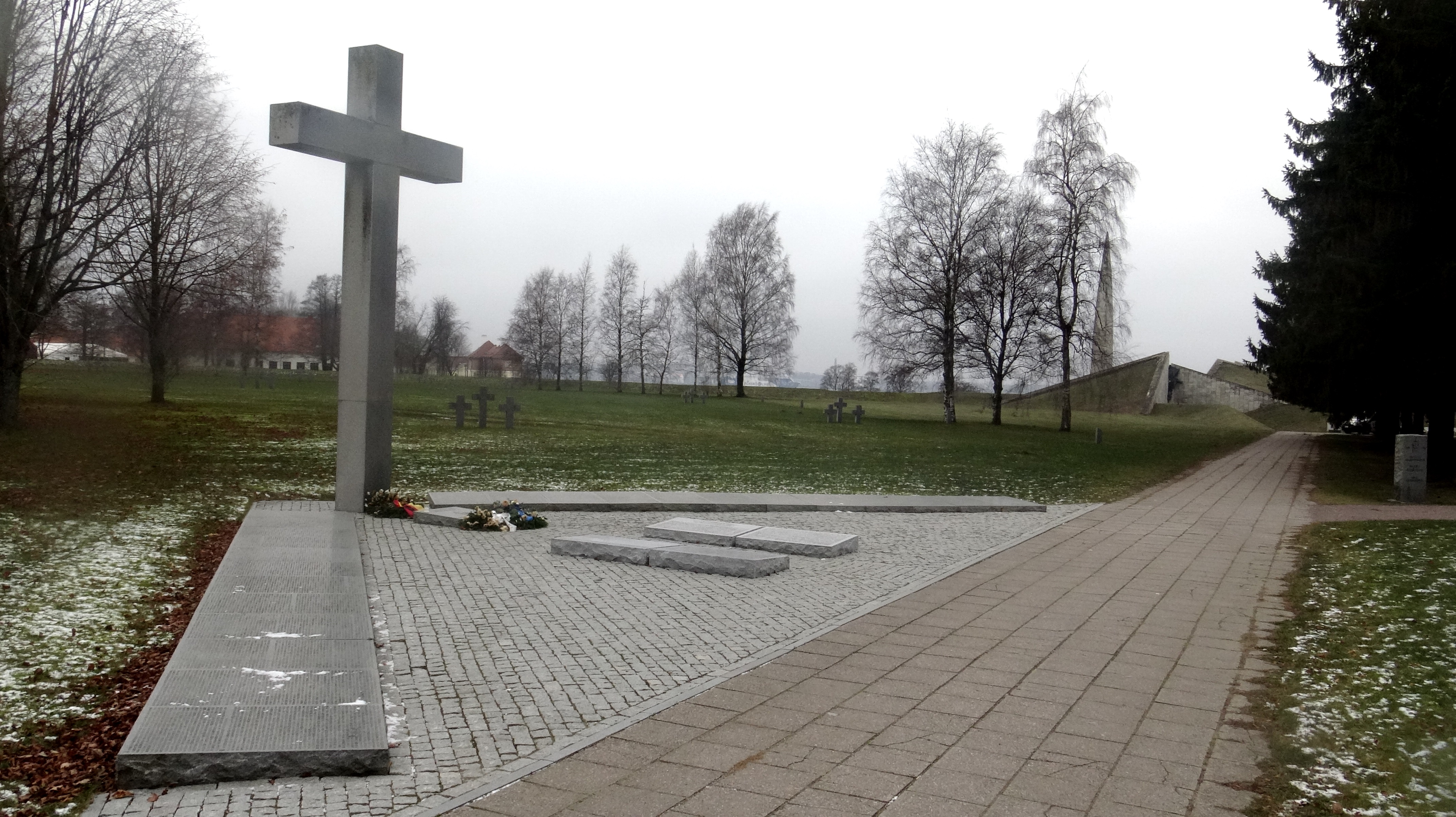 Немецкое Кладбище в Мемориальном комплексе Маарьямяги